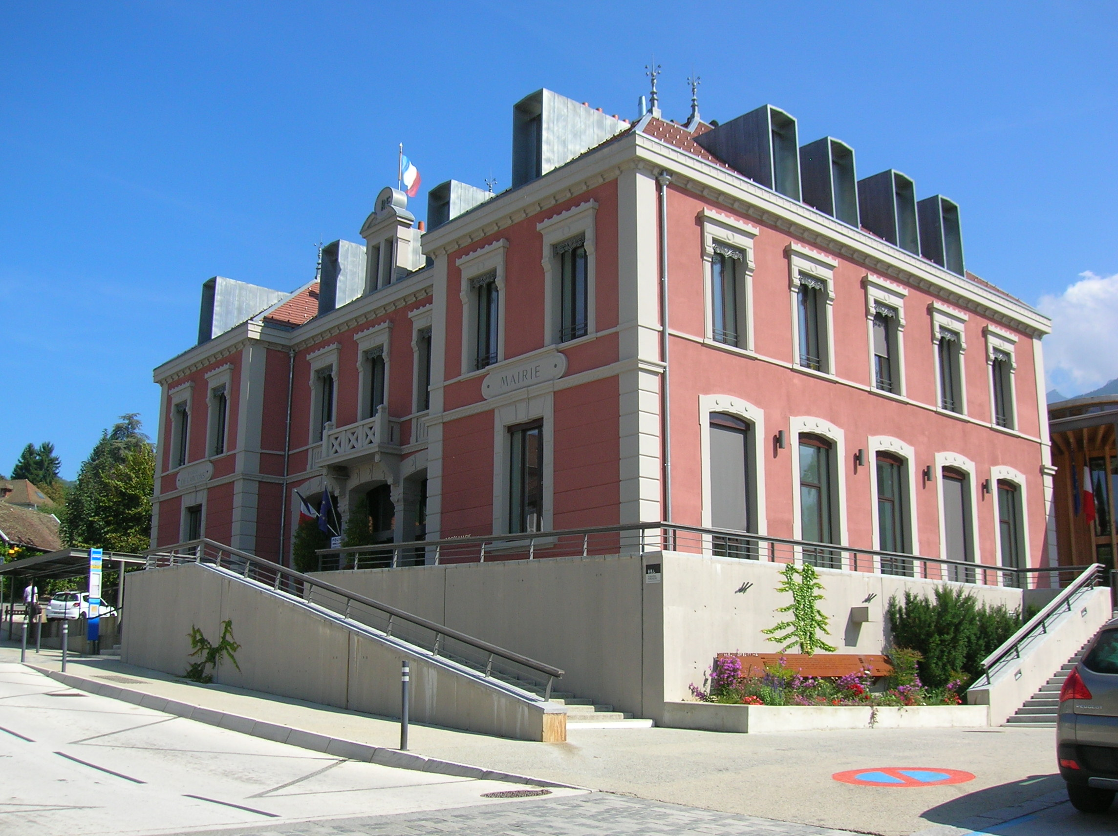 mairie Le bourg de Saint-Martin-d'Uriage, Isère, AuRA, France.